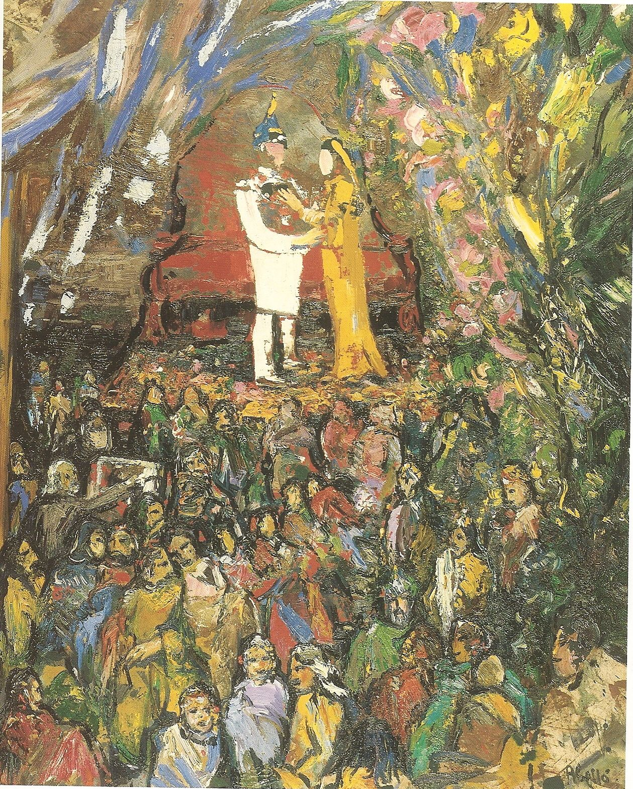 Pintura d'una cerimònia de casament a l'Índia